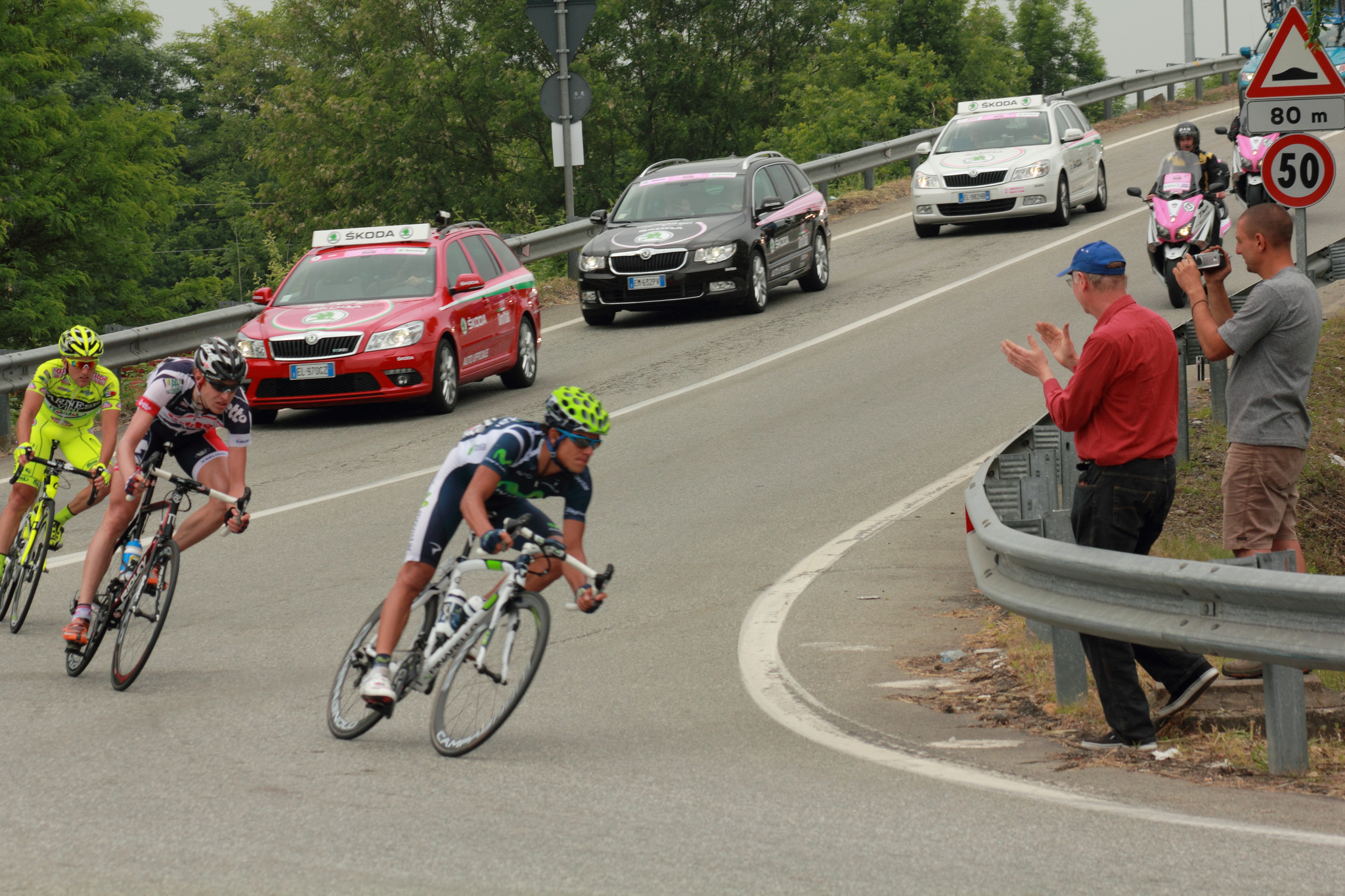 passando da San Benigno Canavese...